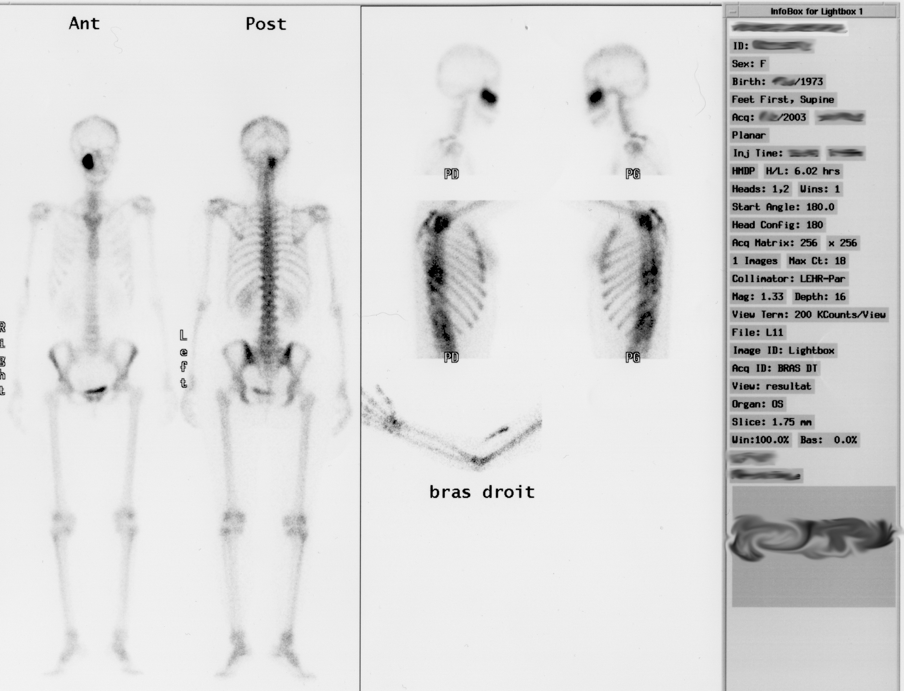 Scintigraphie (Gamma caméra) du squelette humain d'une jeune femme (lésion visible sous l'orbite droite).